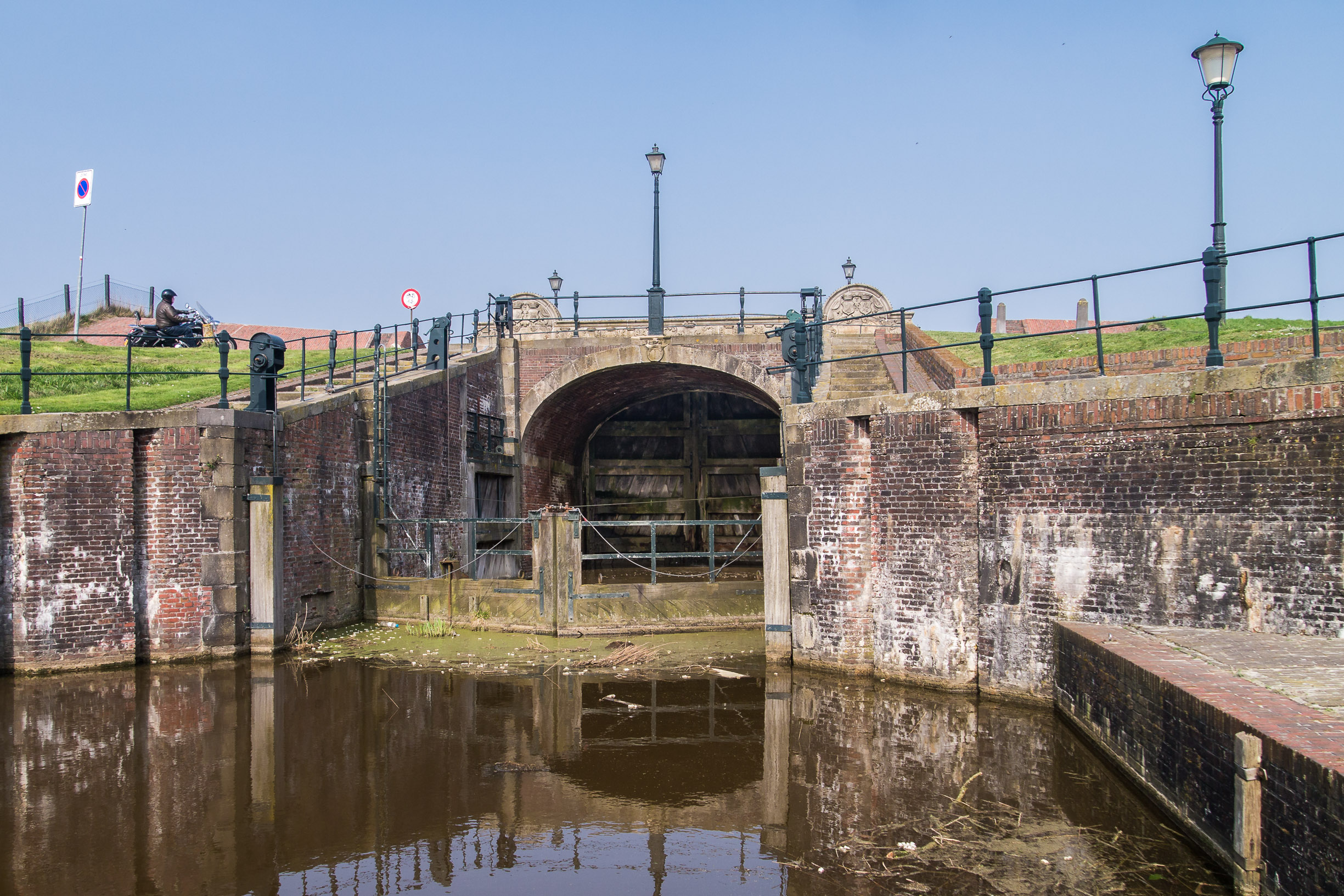 De Boog van Ziel (Landzijde)